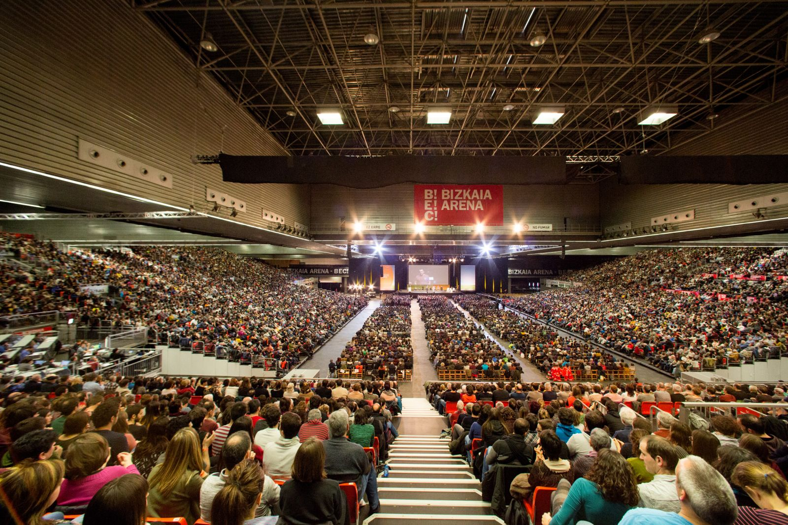 2017ko Bertsolari Txapelketa Nagusiko finalean Argiako Dani Blancok egindako argazkia.